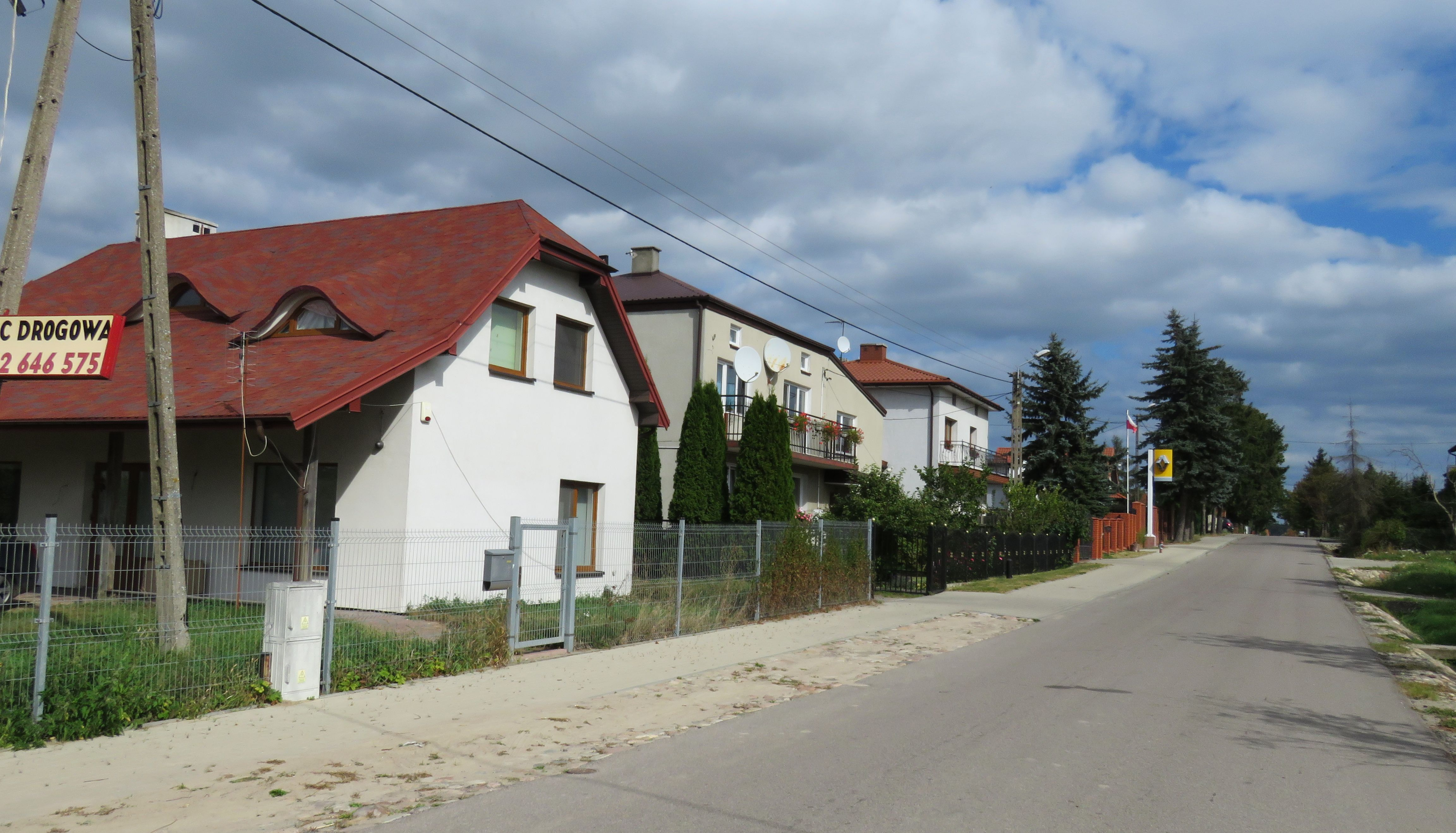 Tatary